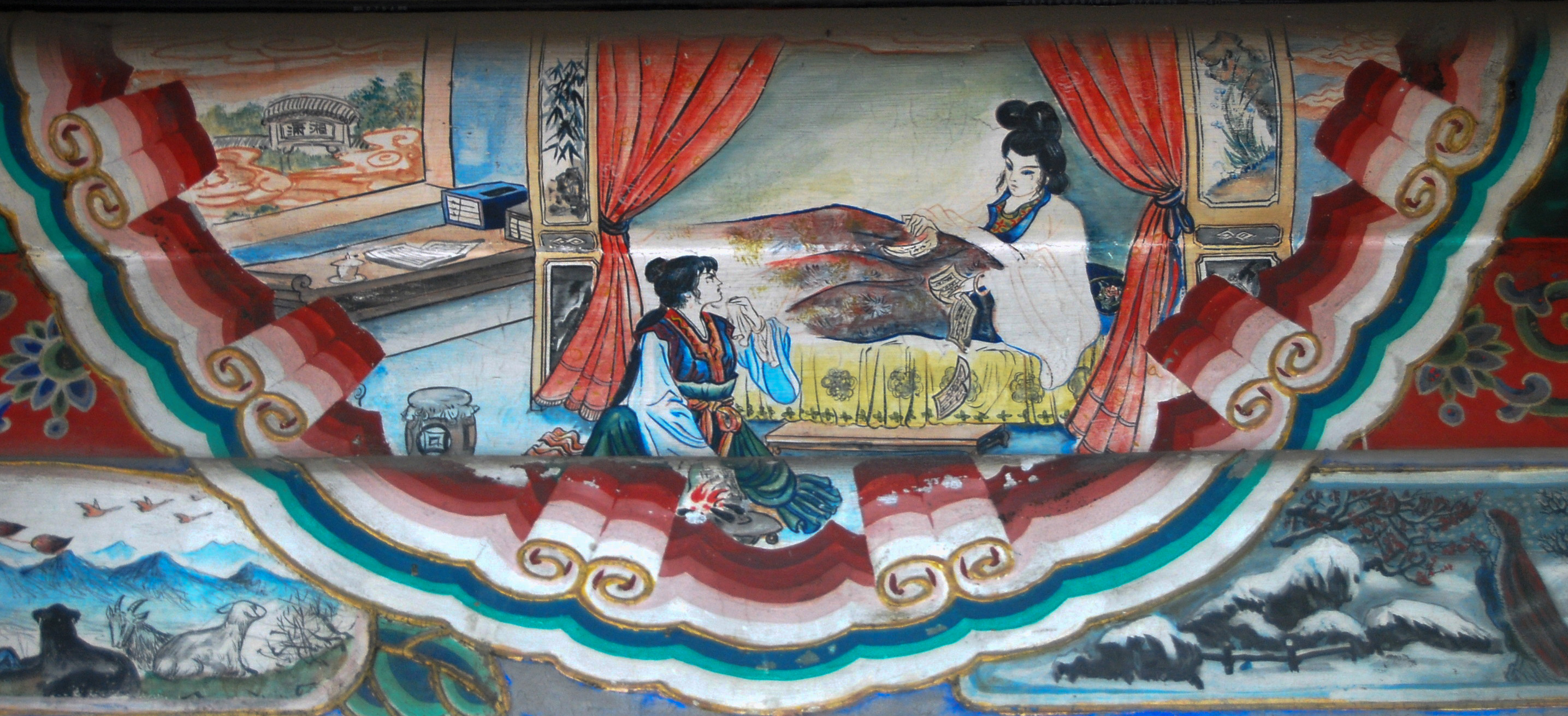 颐和园长廊彩绘：焚稿断痴情（红楼梦故事）